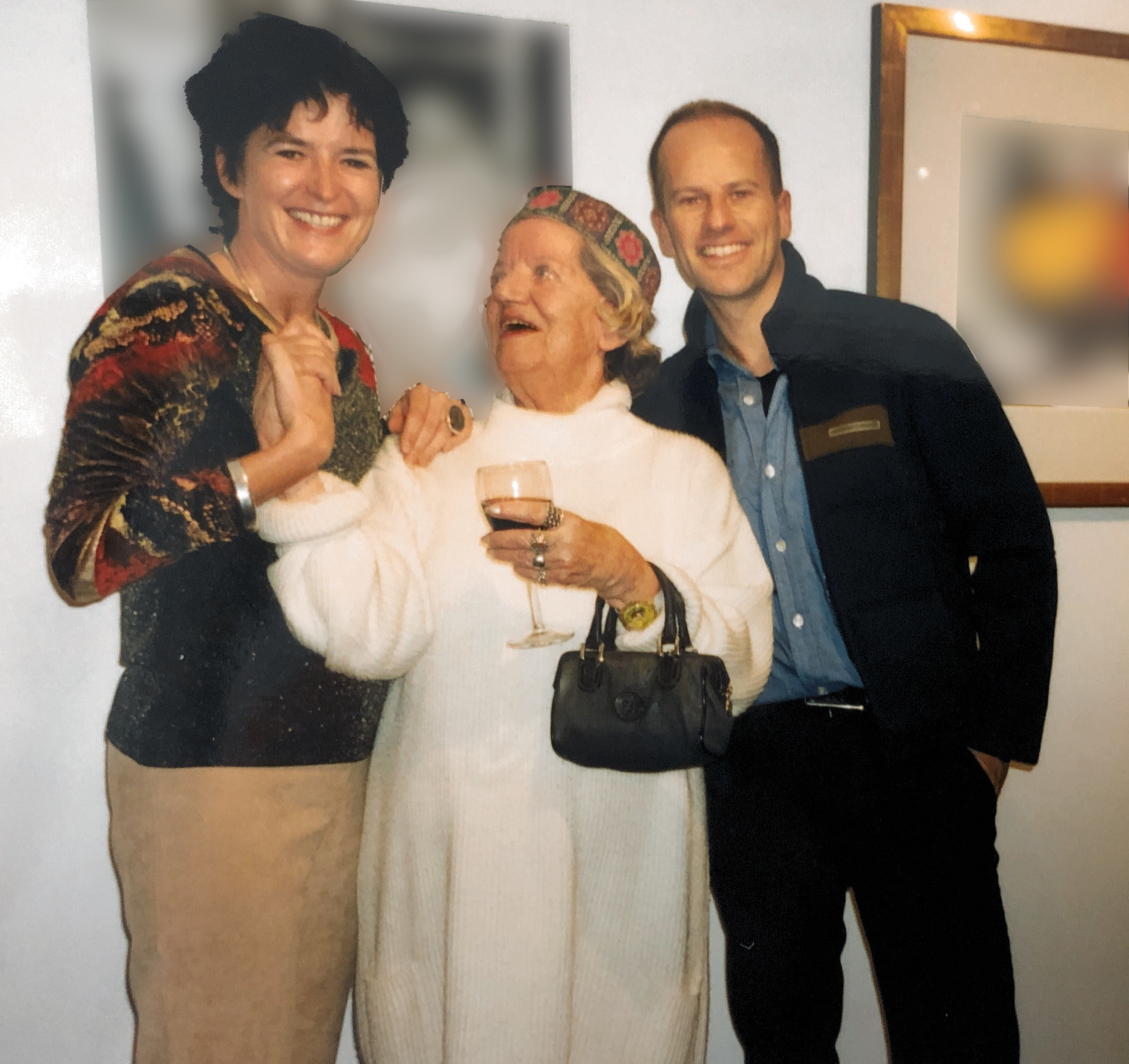 Lisa Meyerlist (Mitte) anlässlich einer ihrer Fotoausstellungen in Luzern, zusammen mit der Autorin Gisela Widmer. Rechts Felix Schenker, der eine Fotobuch über die Fotografin realisierte.